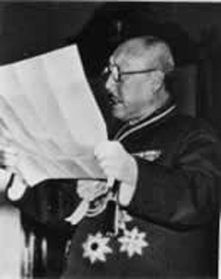 Zhang Jinghui (张景惠)Wade-Giles: Chang Ching-hui; 1871 - 1959